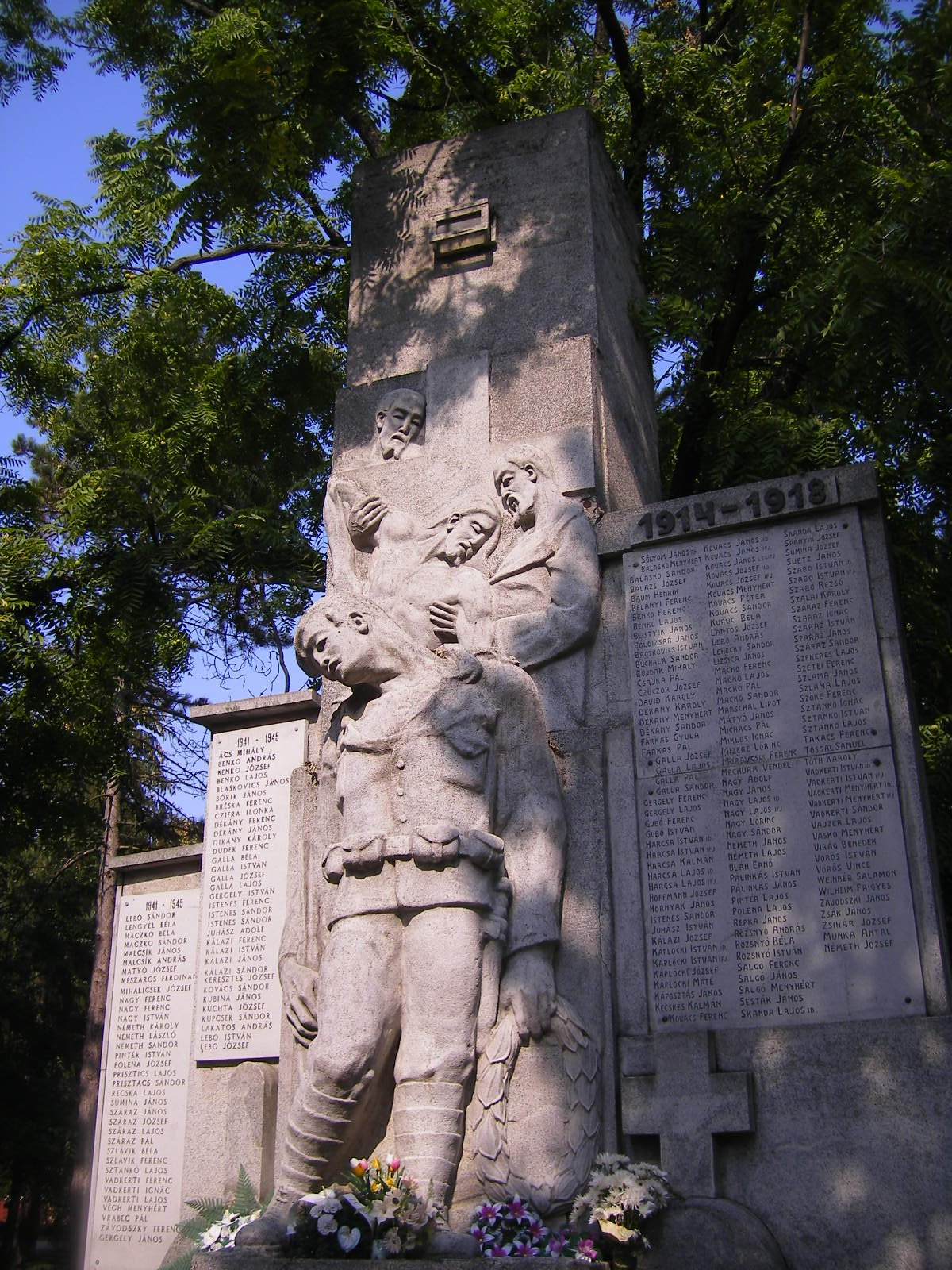 Udvard - világháborús emlékmű